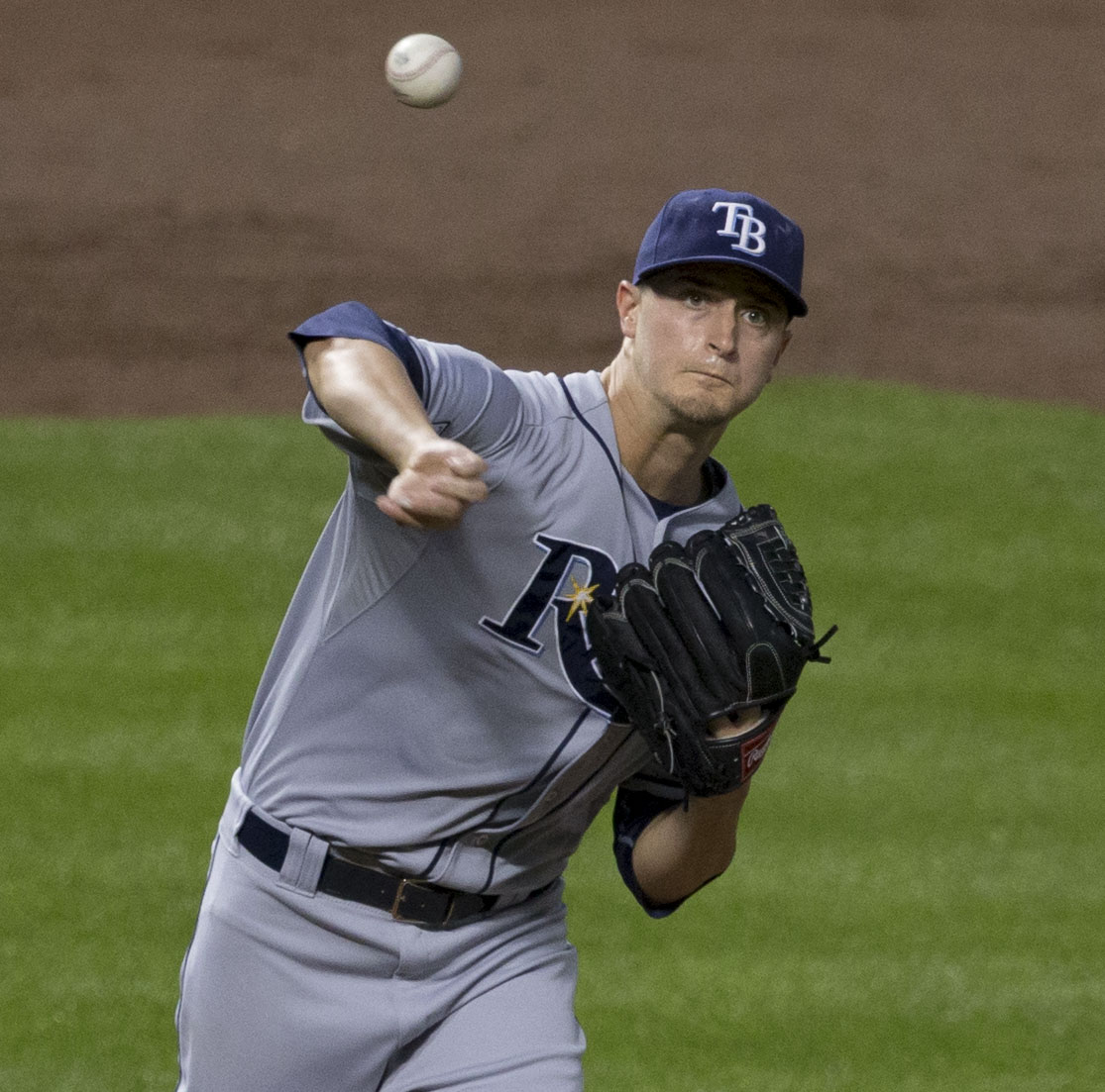 Jake Odorizzi